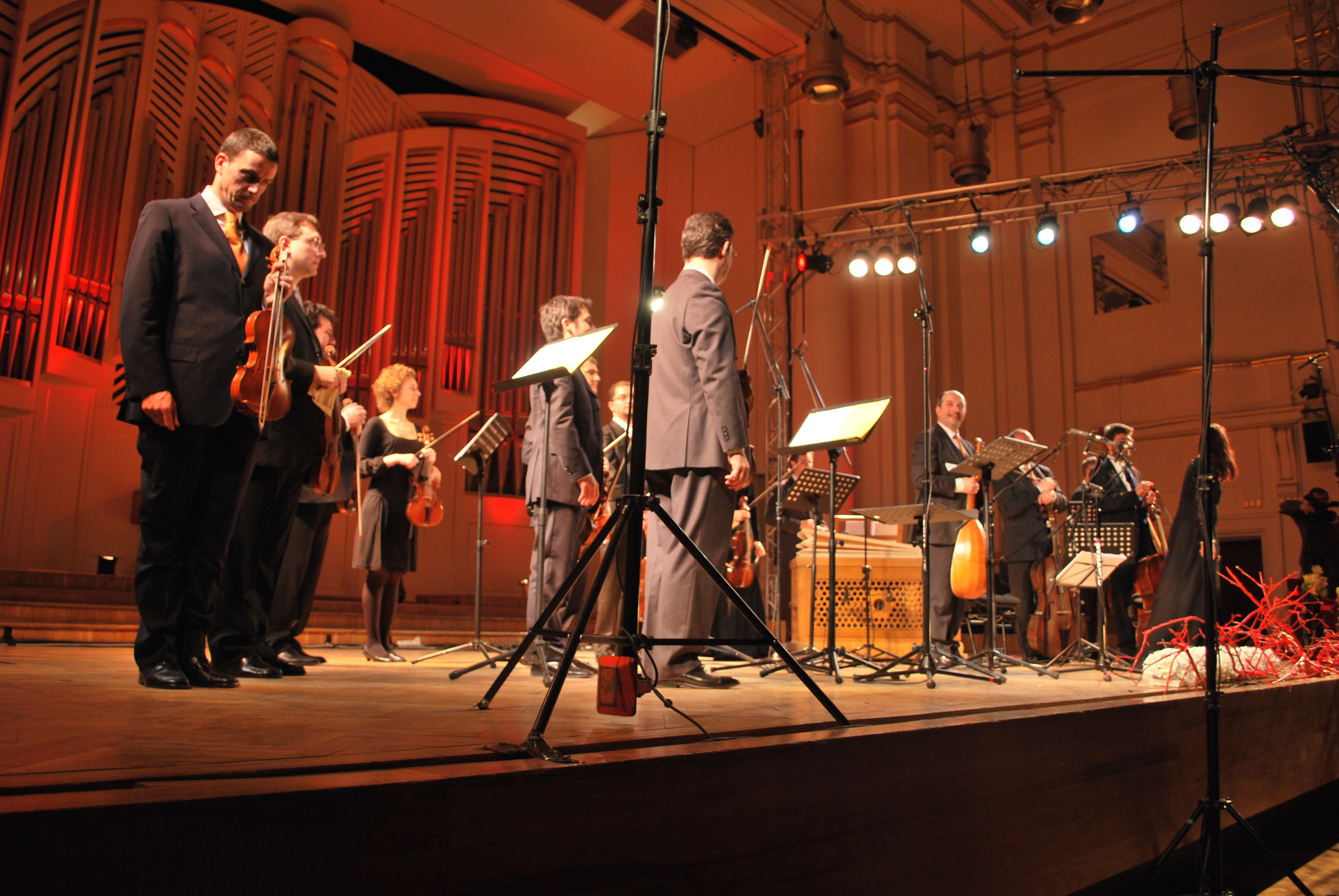 Venice Baroque Orchestra podczas koncertu w Filharmonii Krakowskiej w ramach festiwalu Misteria Paschalia, 10 kwietnia 2009.